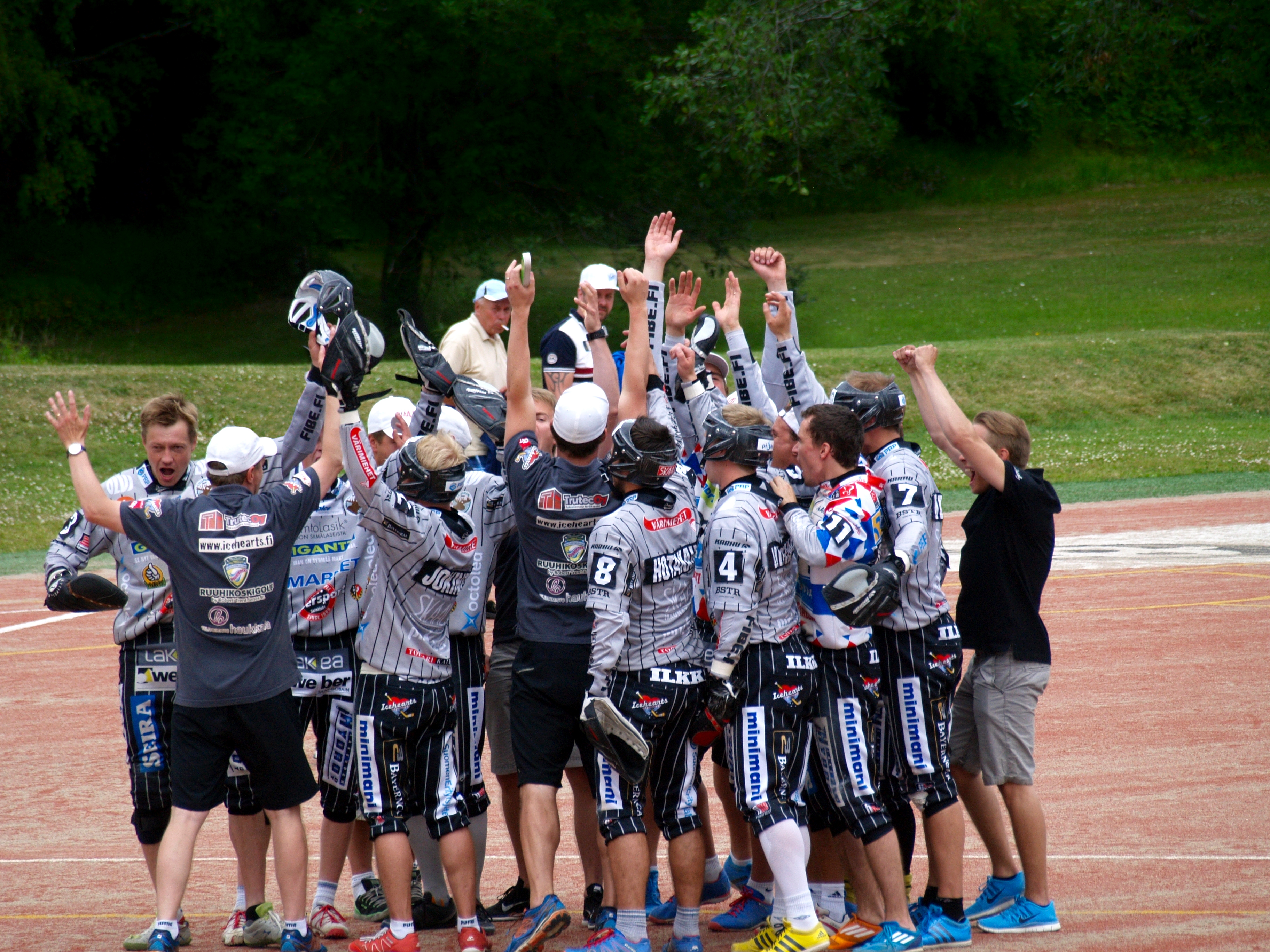 Vimpelin Veto - JymyJussit pesäpallo-ottelu 13.7.2014. JymyJussit hurraamassa voitettua ottelua.